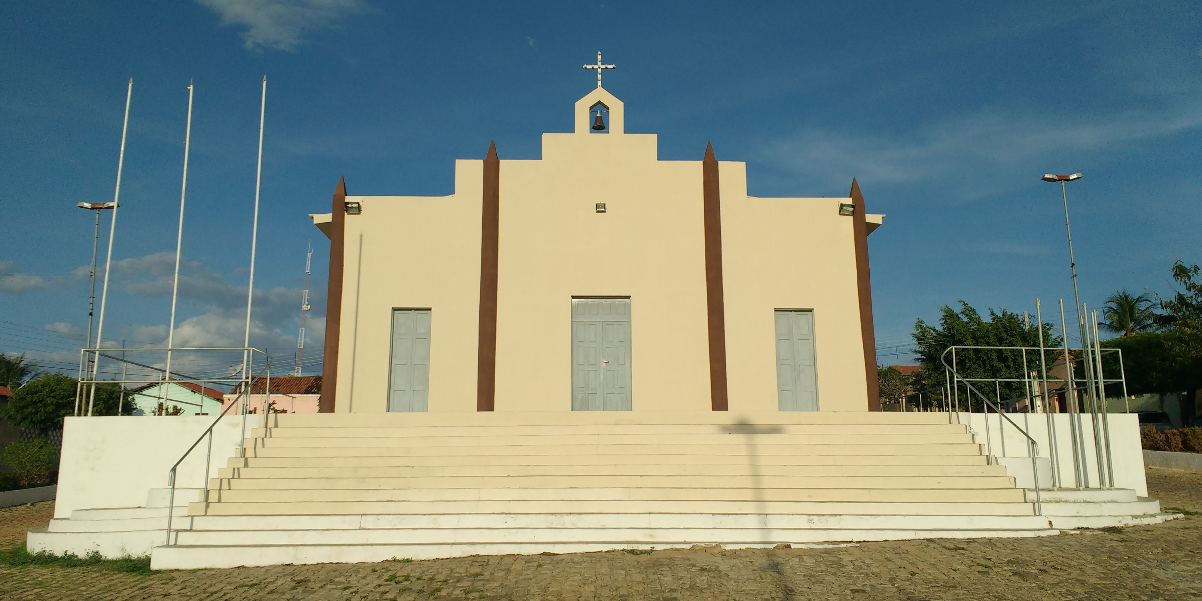 Capela São João Batista em Riacho de Santana, Rio Grande do Norte (Brasil), que pertence à paróquia de José da Penha.